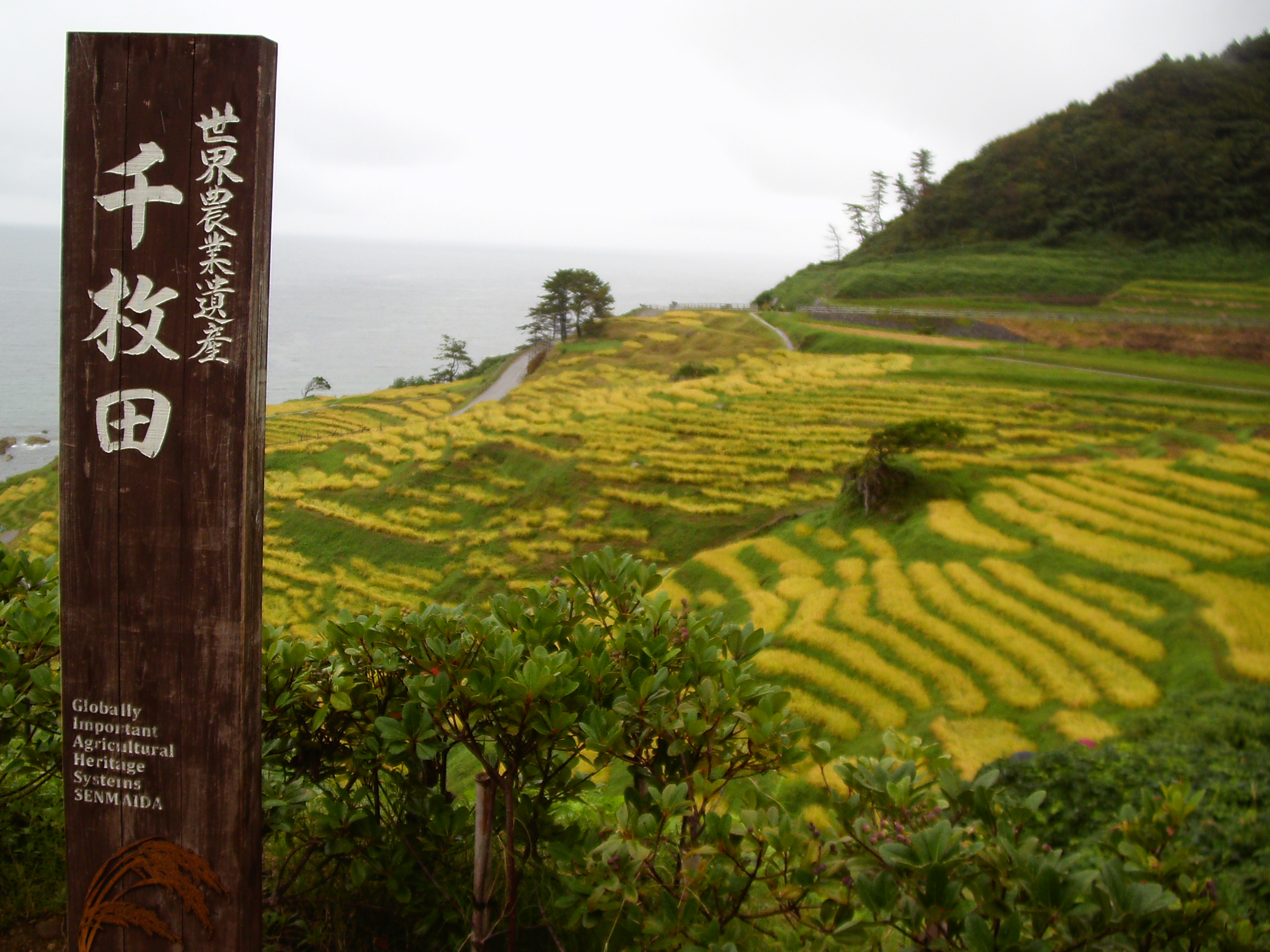 国指定名勝・FAO農業遺産「白米千枚田」